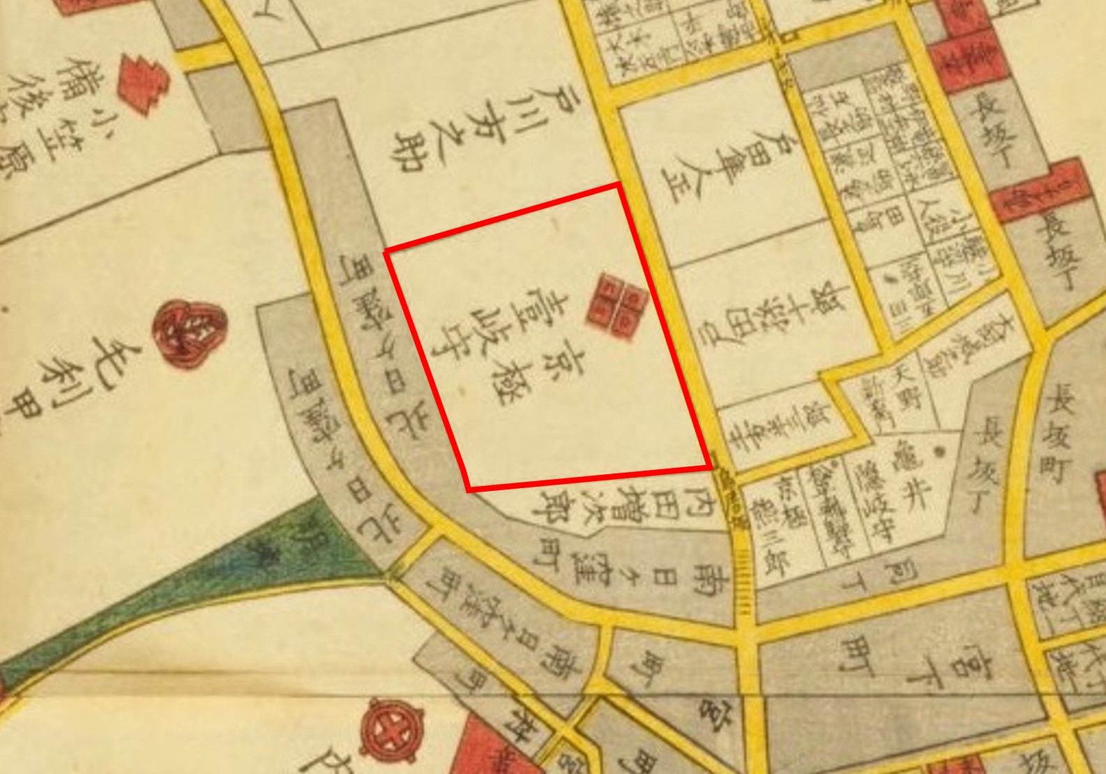 Residence of Kyogoku clan T